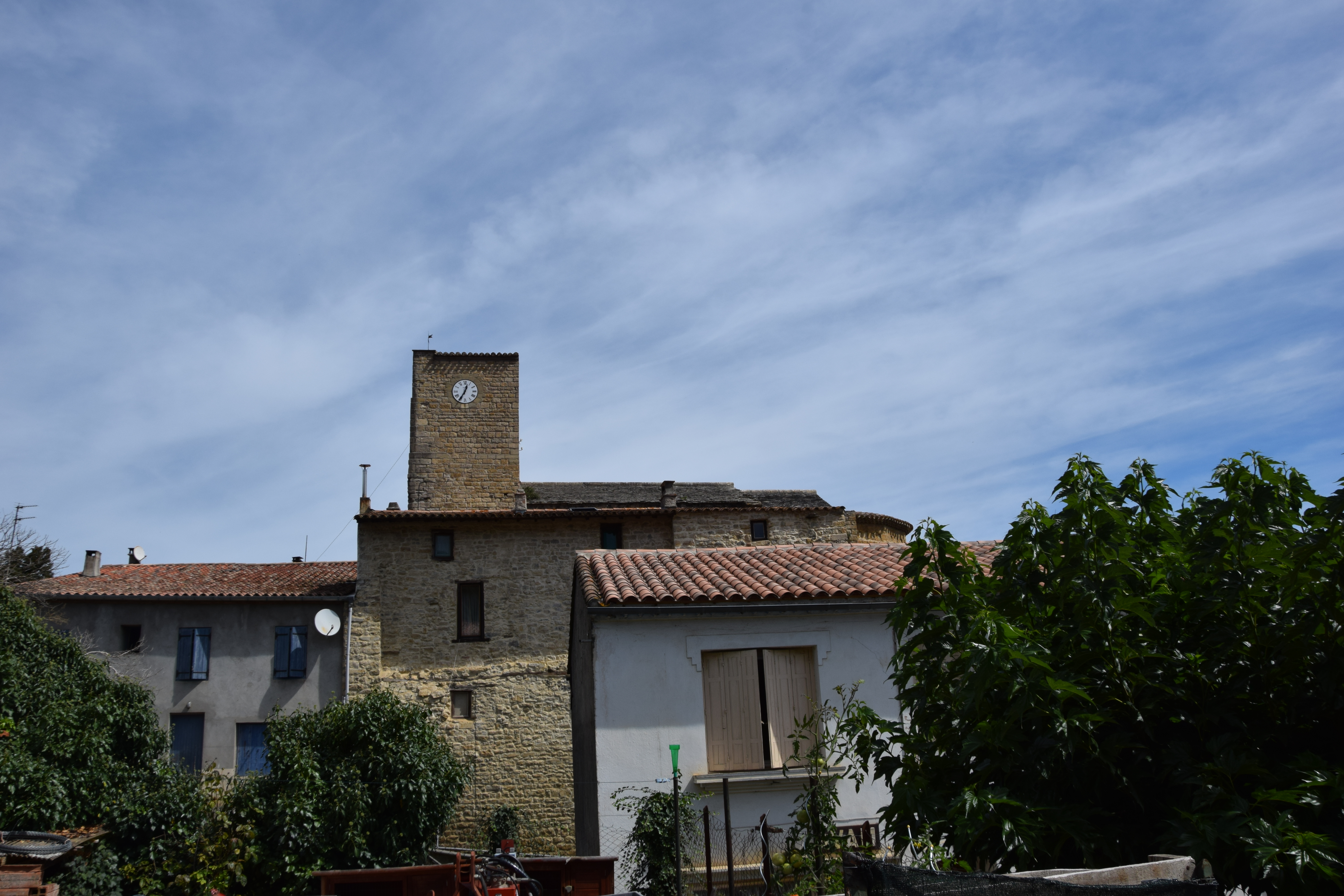 Église Saint-André à Antugnac .